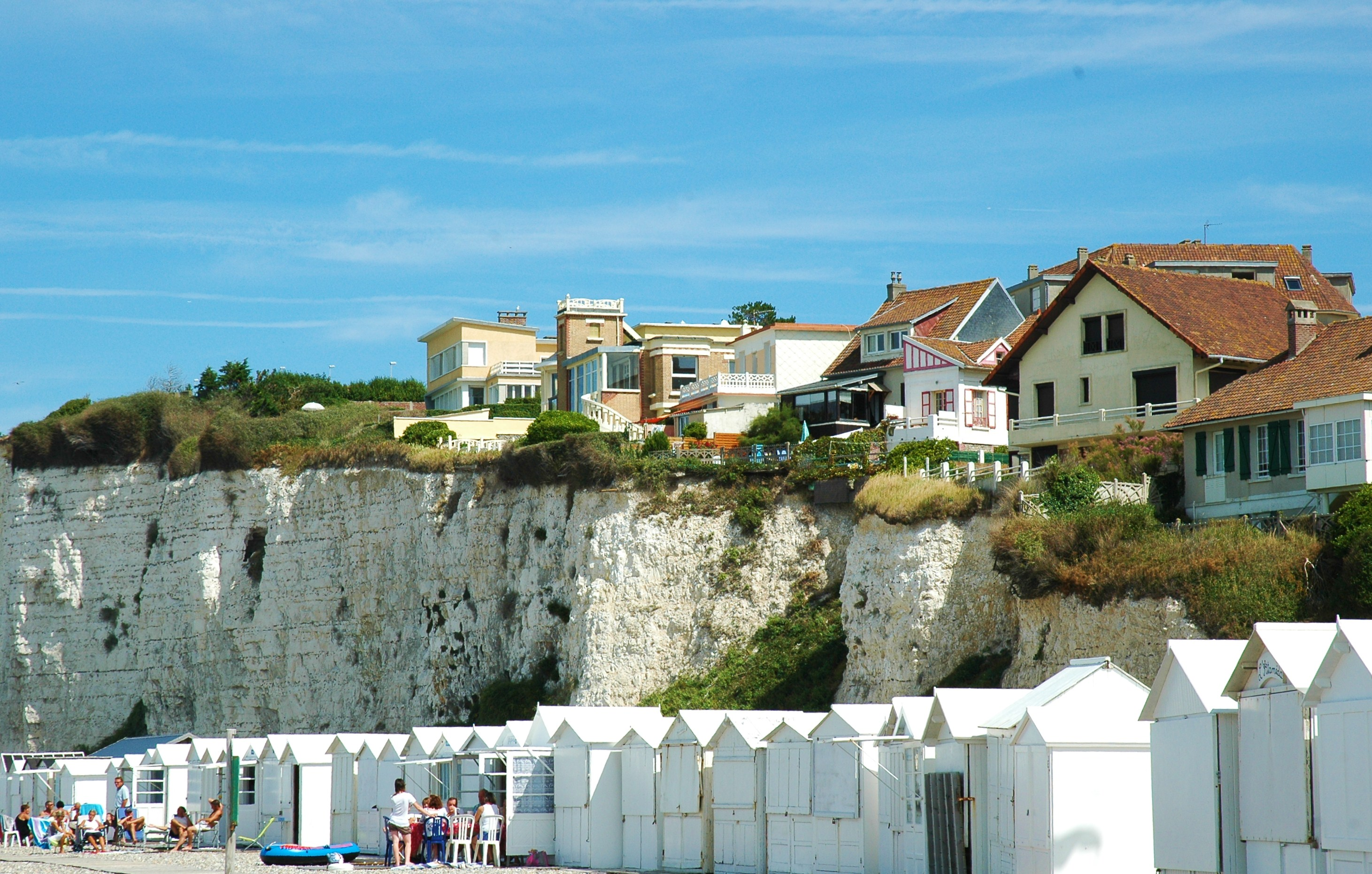 Criel-sur-Mer, Seine-Maritime, France